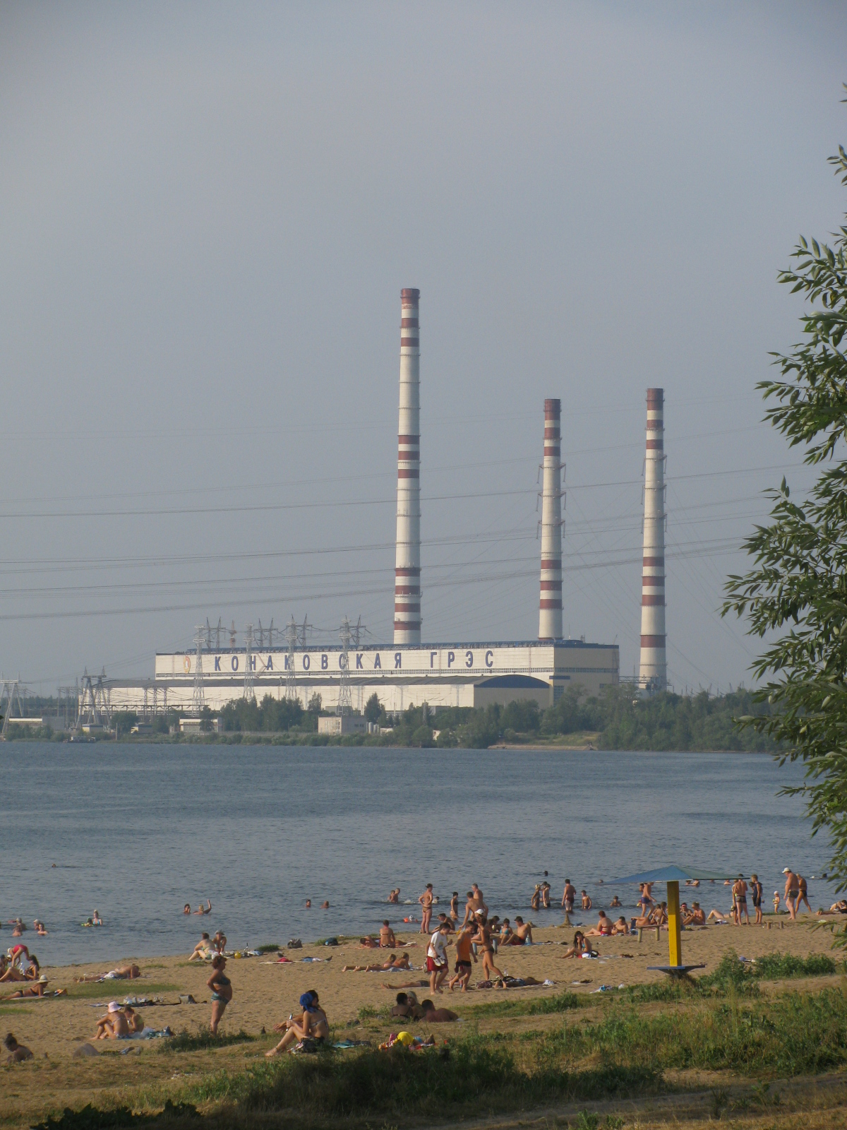 Конаковская ГРЭС. Вид с Конаковского городского пляжа, лето 2008 г.